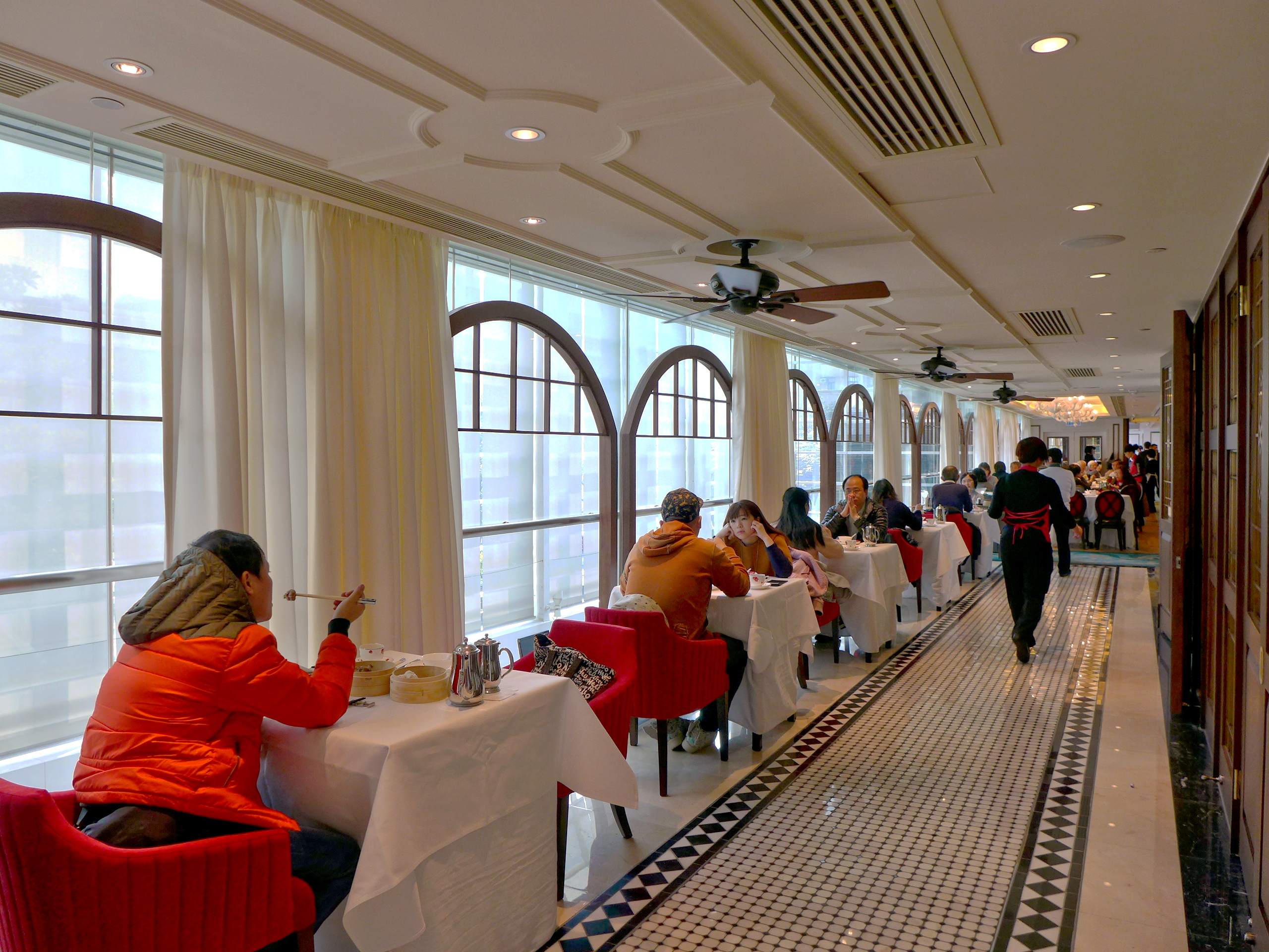 Sichuan Garden, New Town Plaza